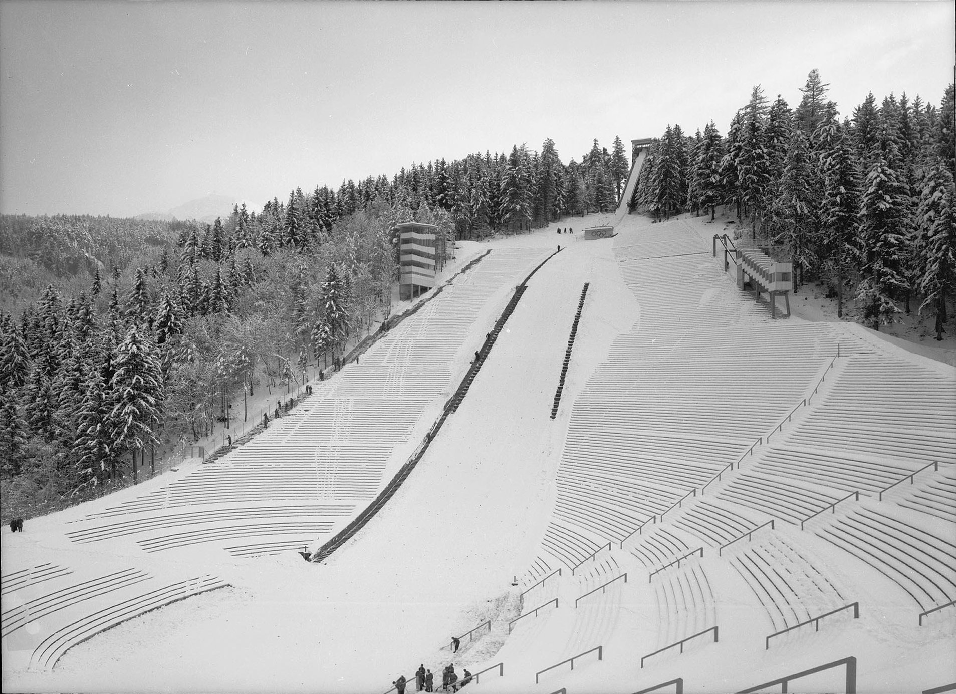 Bergiselschanze